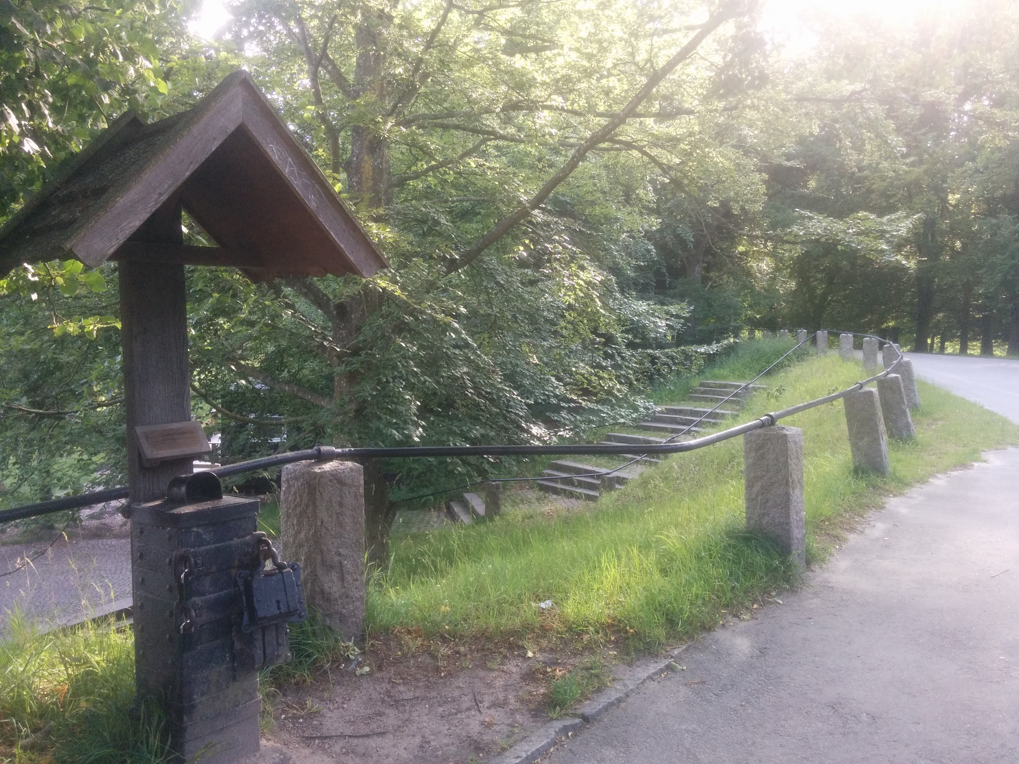 Kildeblokken står ved vejen, ovenfor selve kilden.